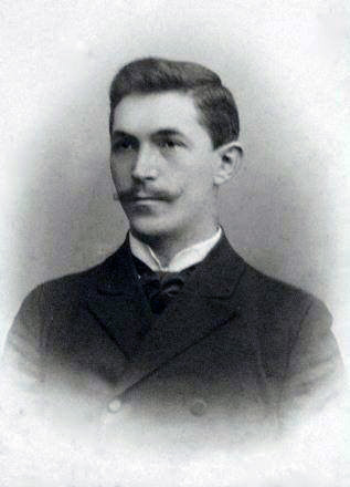 Портрет Данила Щербаківського.